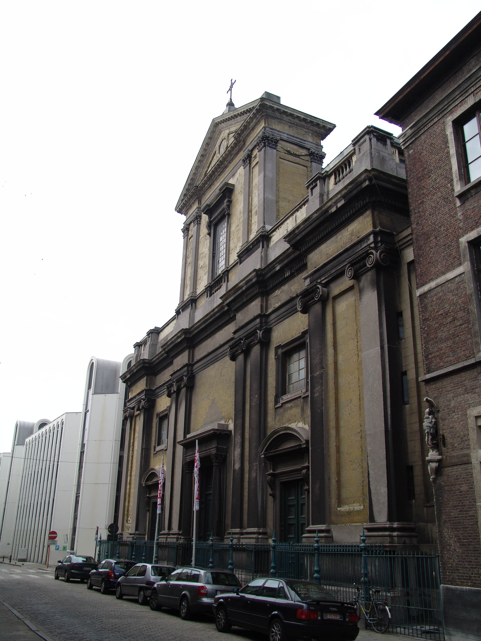 België, Gent, Kerk, Sint-Barbaracollege